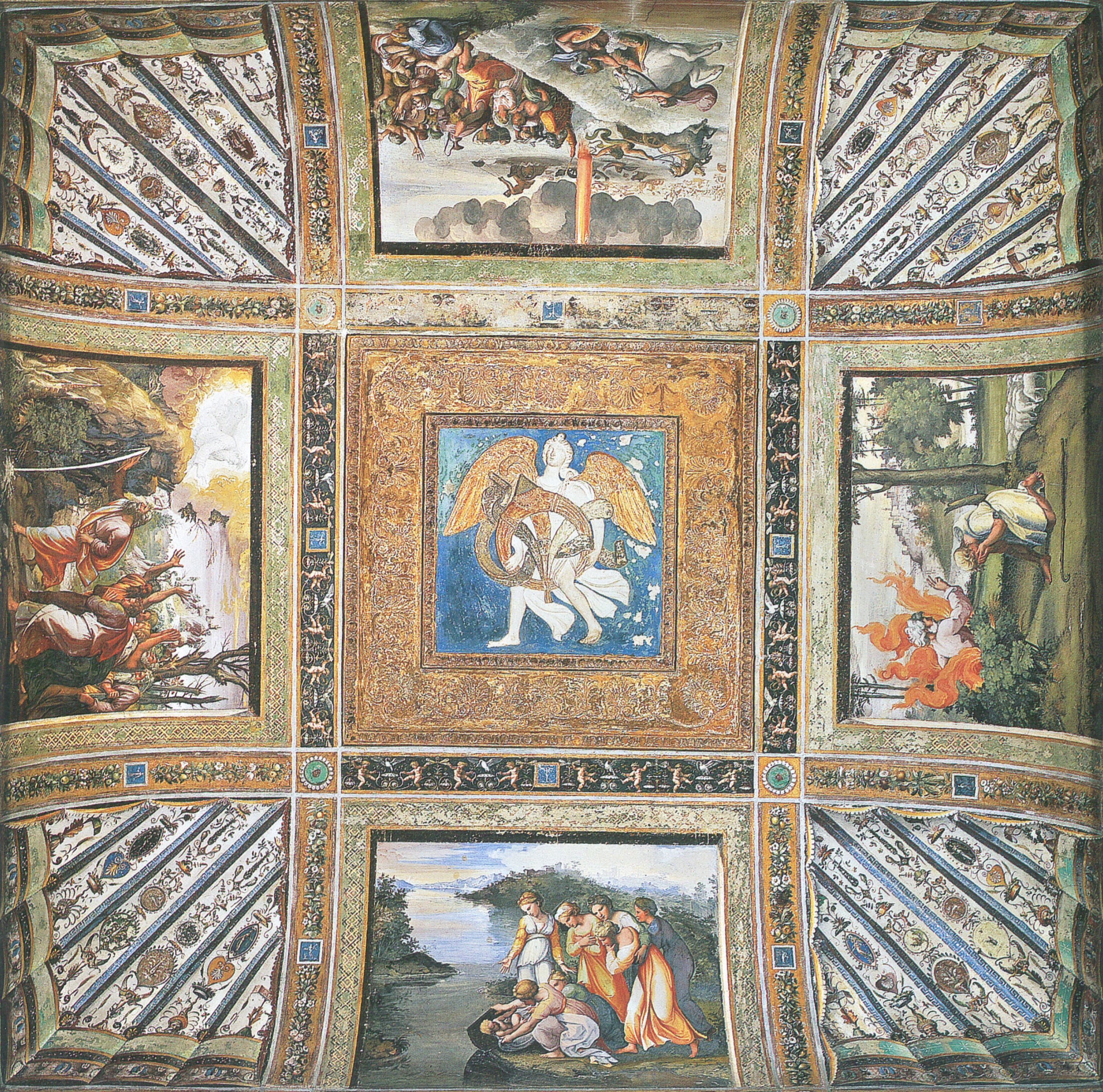 Ottava volta - storie di Mosè